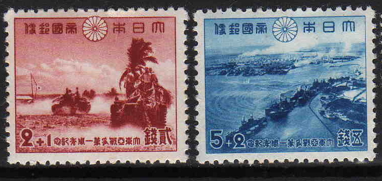 1942年発行の寄附金付記念切手